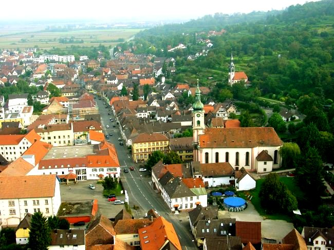 Luftbild von Herbolzheim aufgenommen bei einer Ballonfahrt